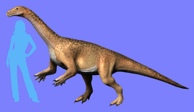 Riojasaurus incertus.